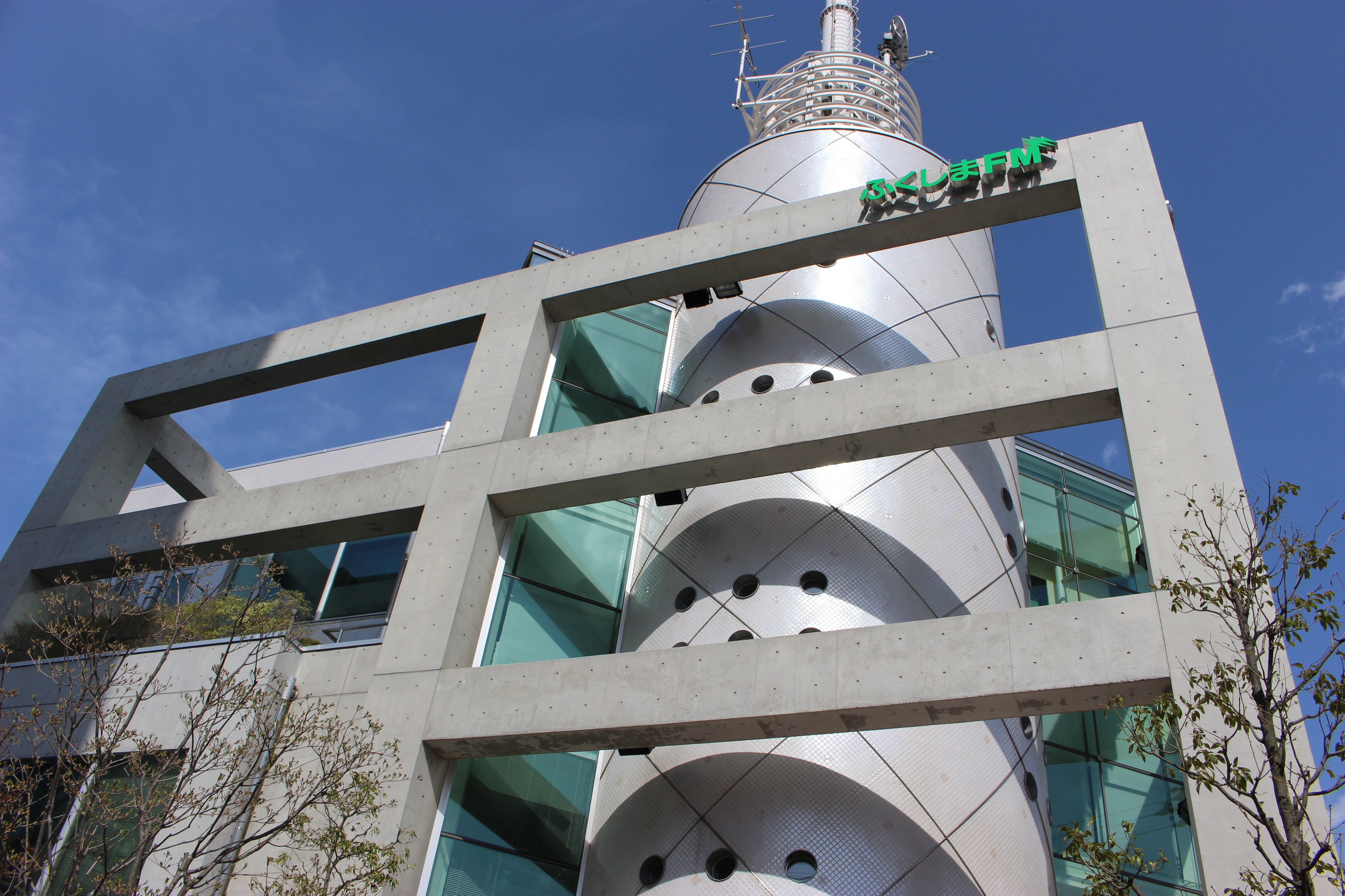 エフエム福島本社（郡山市）